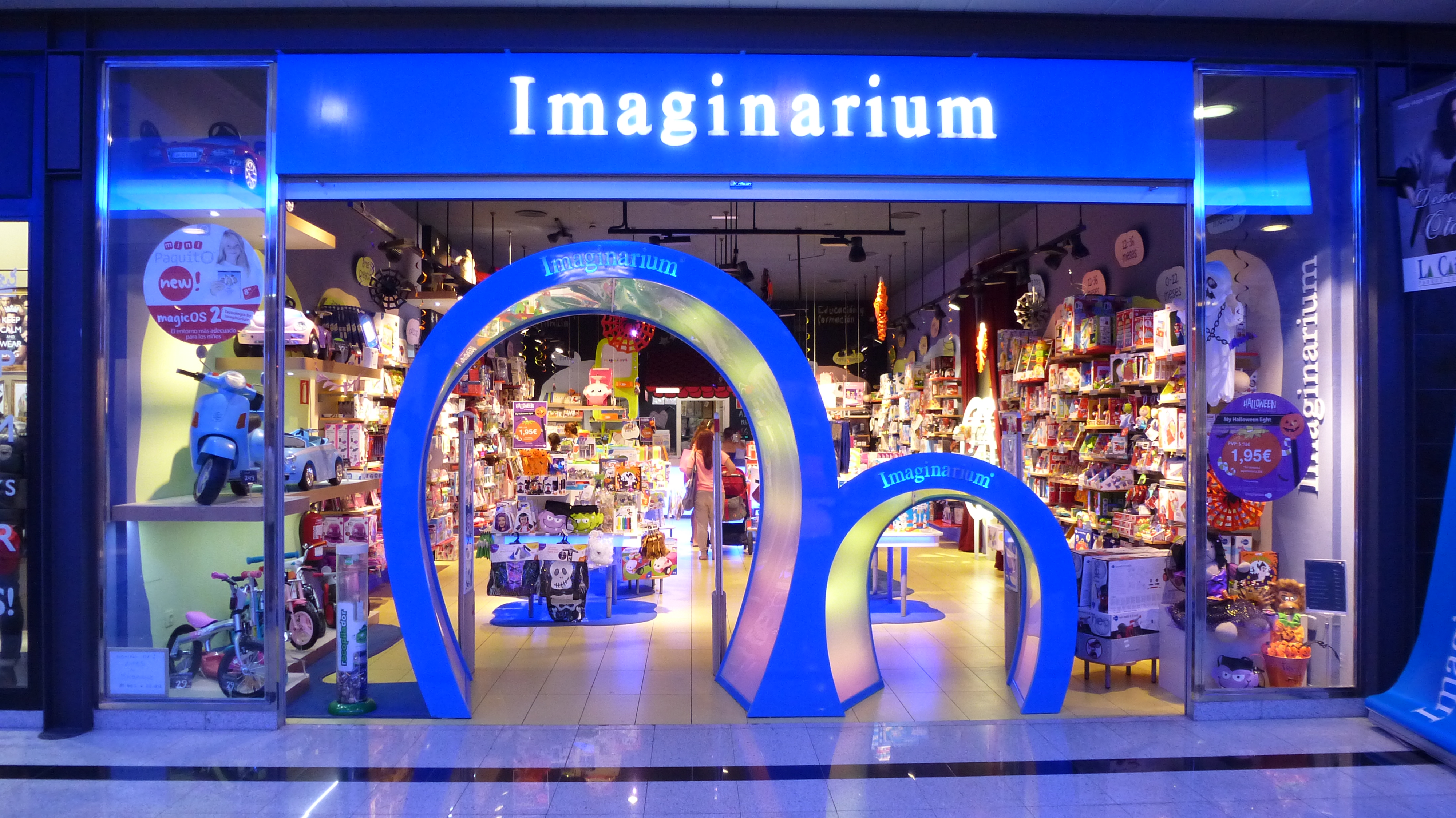 Imaginarium.